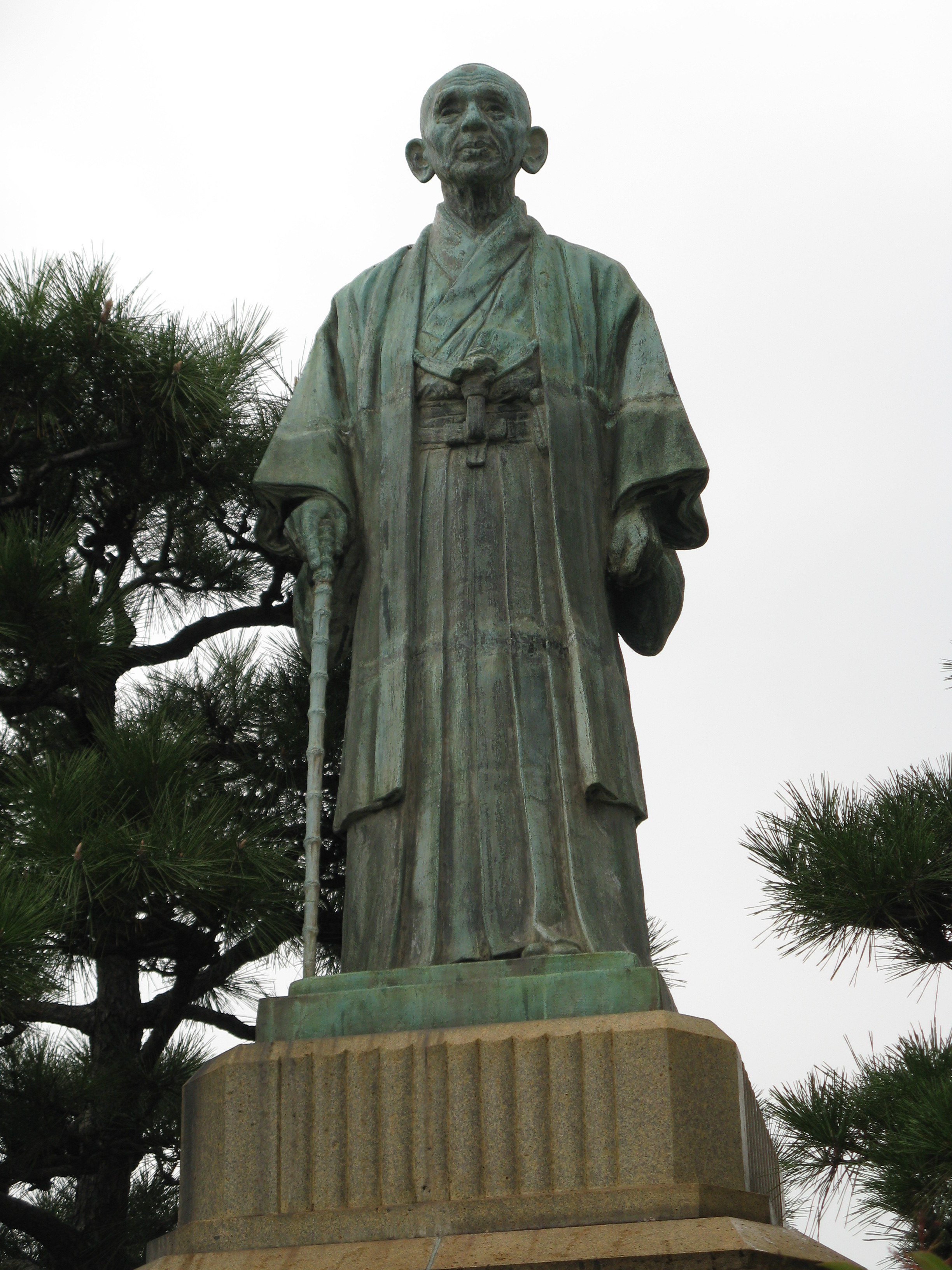 明石公園 中部幾次郎像